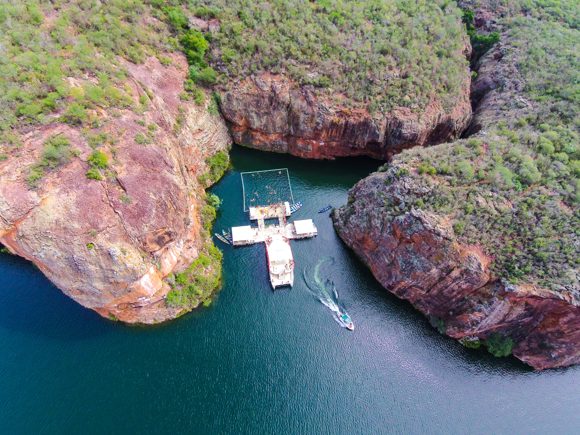 Cânions no Rio São Francisco, na cidade de Canindé de São Francisco, Sergipe. Foto feita por drone